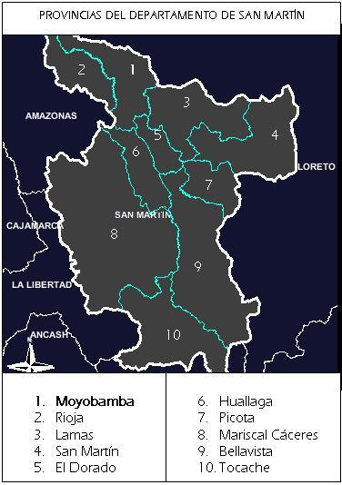 División política de San Martín. San Martin Provincias 2